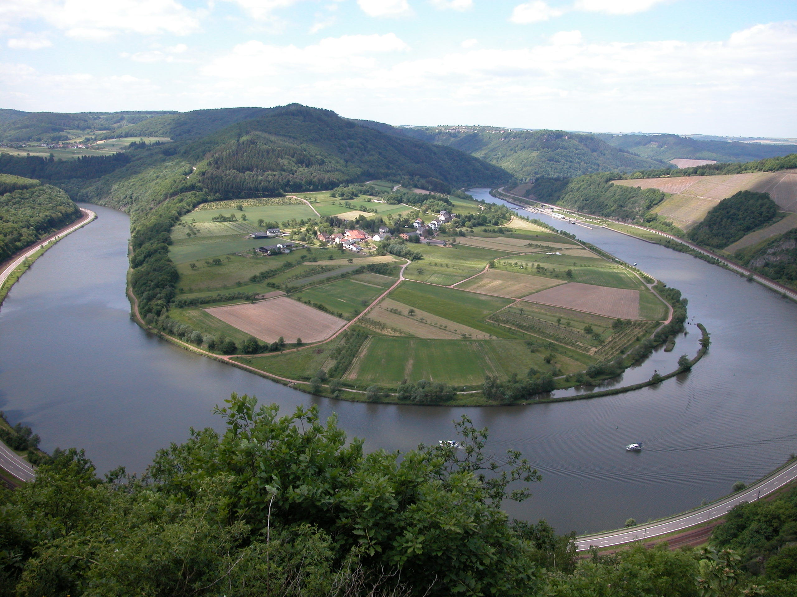 Saarschleife bei Taben/Hamm